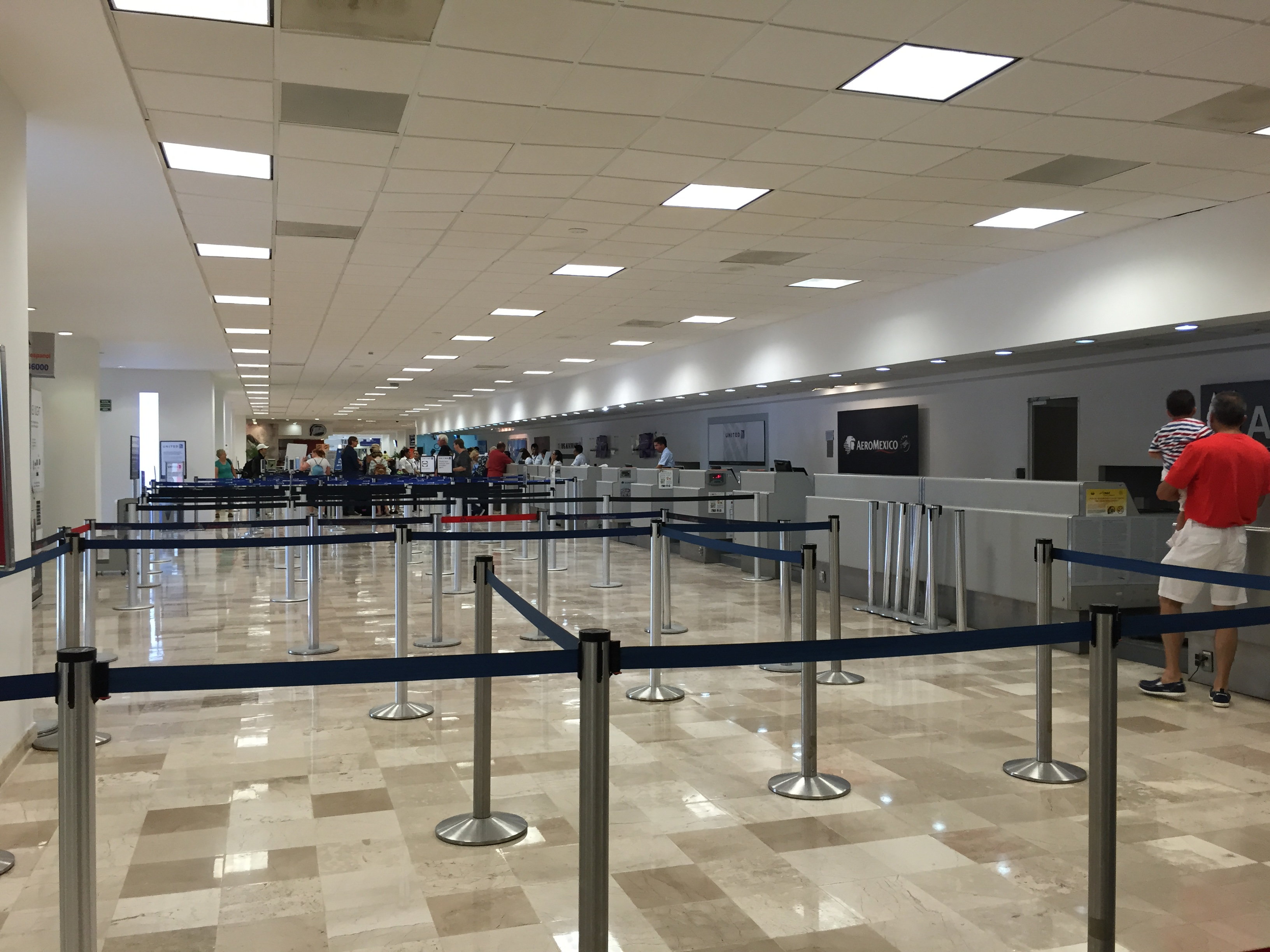 Mostradores de documentación del Aeropuerto de Ixtapa-Zihuatanejo.